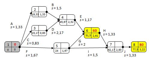 PERT-sivun kuvitusta, verkko 5.